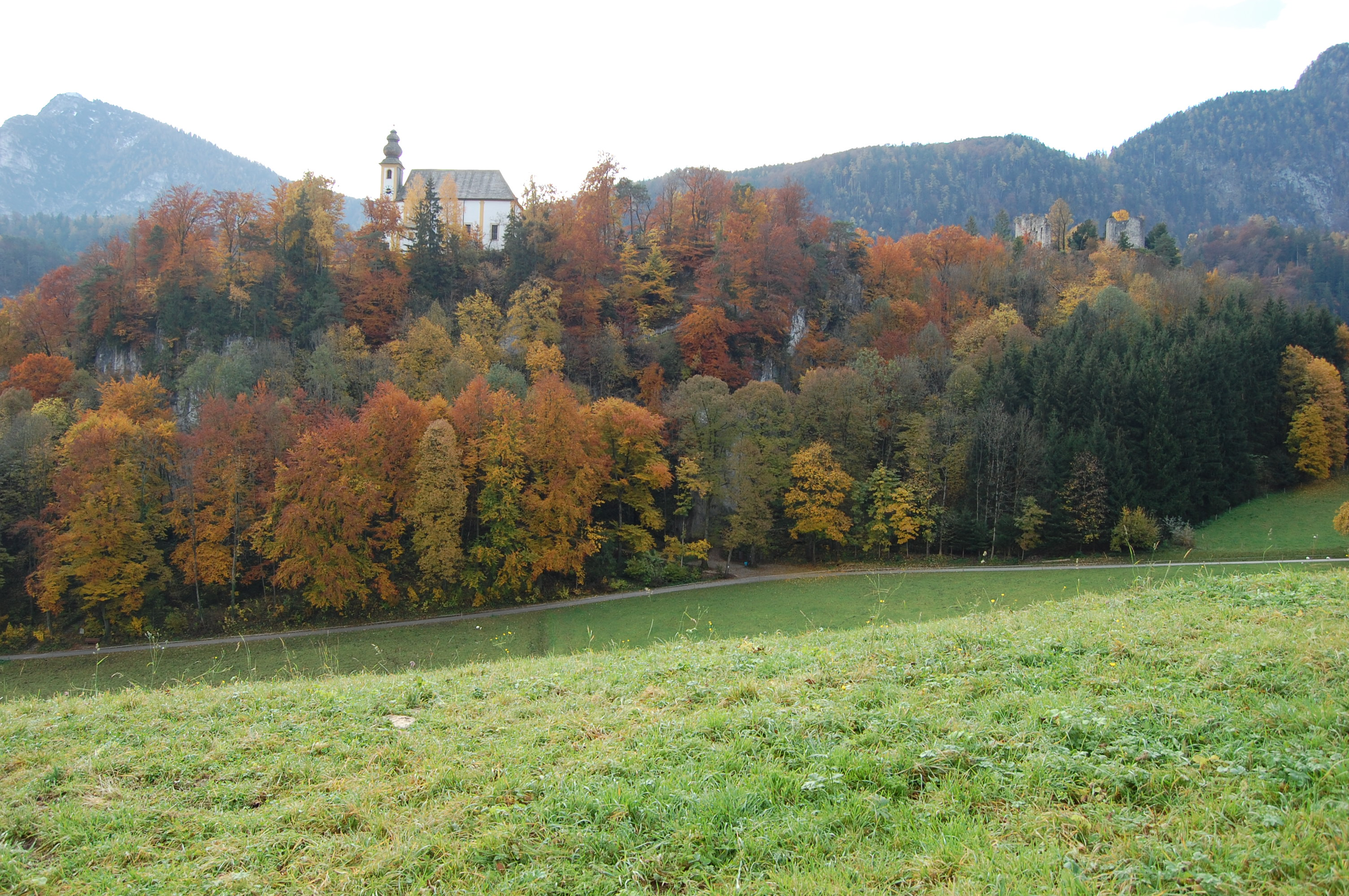 Wallfahrtskirche St. Pankratius und Burgruine Karlstein bei Bad Reichenhall